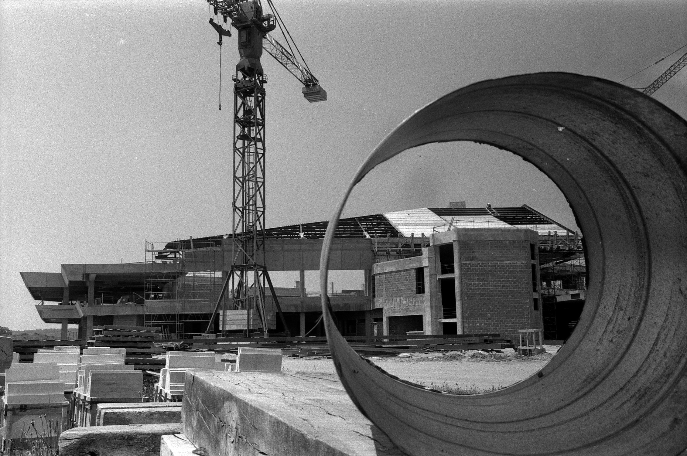 Aérogare de Toulouse-Blagnac. Le 12 Juin 1976. Vue des travaux de l'aérogare de Toulouse-Blagnac.